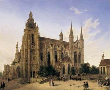 Der Dom zu Wetzlar